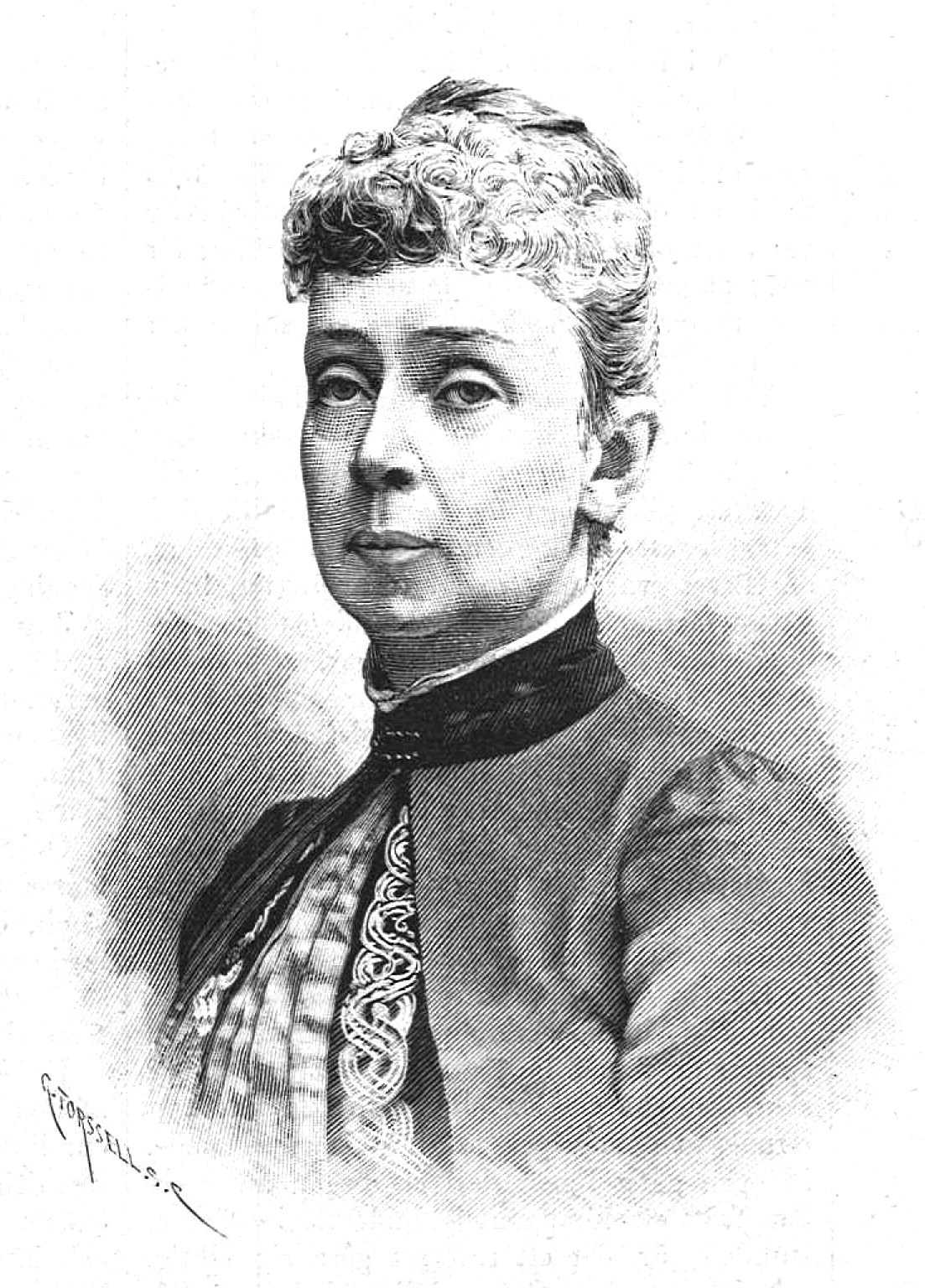 Ebba Åkerhielm (1841-1913)